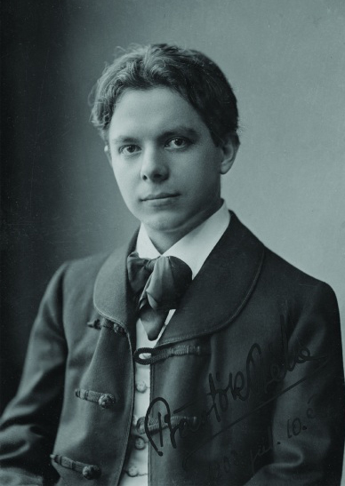 Bartók Béla ifjúkori fényképe